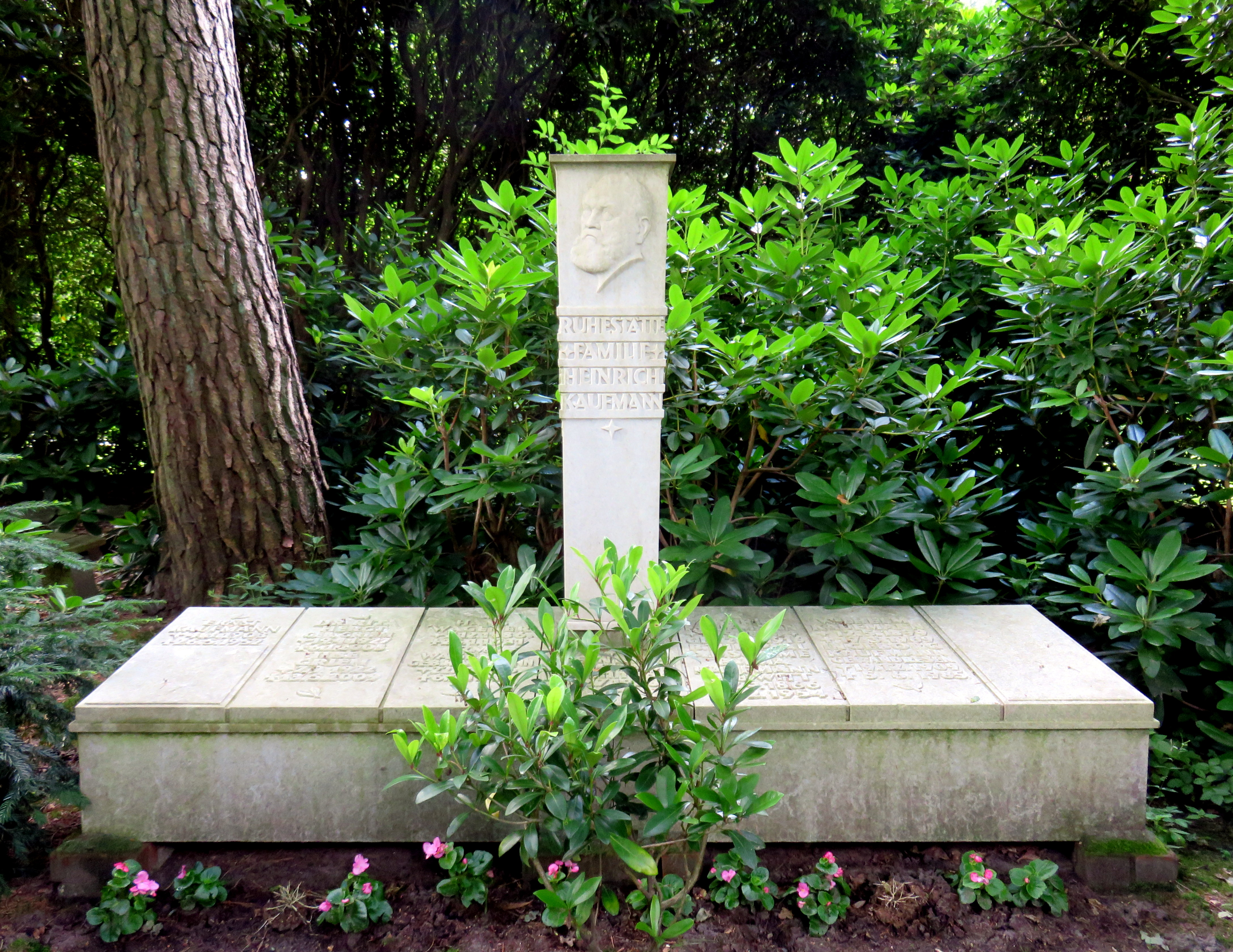 Familiengrab Heinrich Kaufmann (Pädagoge und Ideologe, engagiert in der Genossenschaftsbewegung), Friedhof Ohlsdorf, Planquadrat U26, 124-6 (Kapellenstraße/östlich Lippertplatz). Das Marmor-Grabmal mit Porträt-Relief wurde 1928 geschaffen.